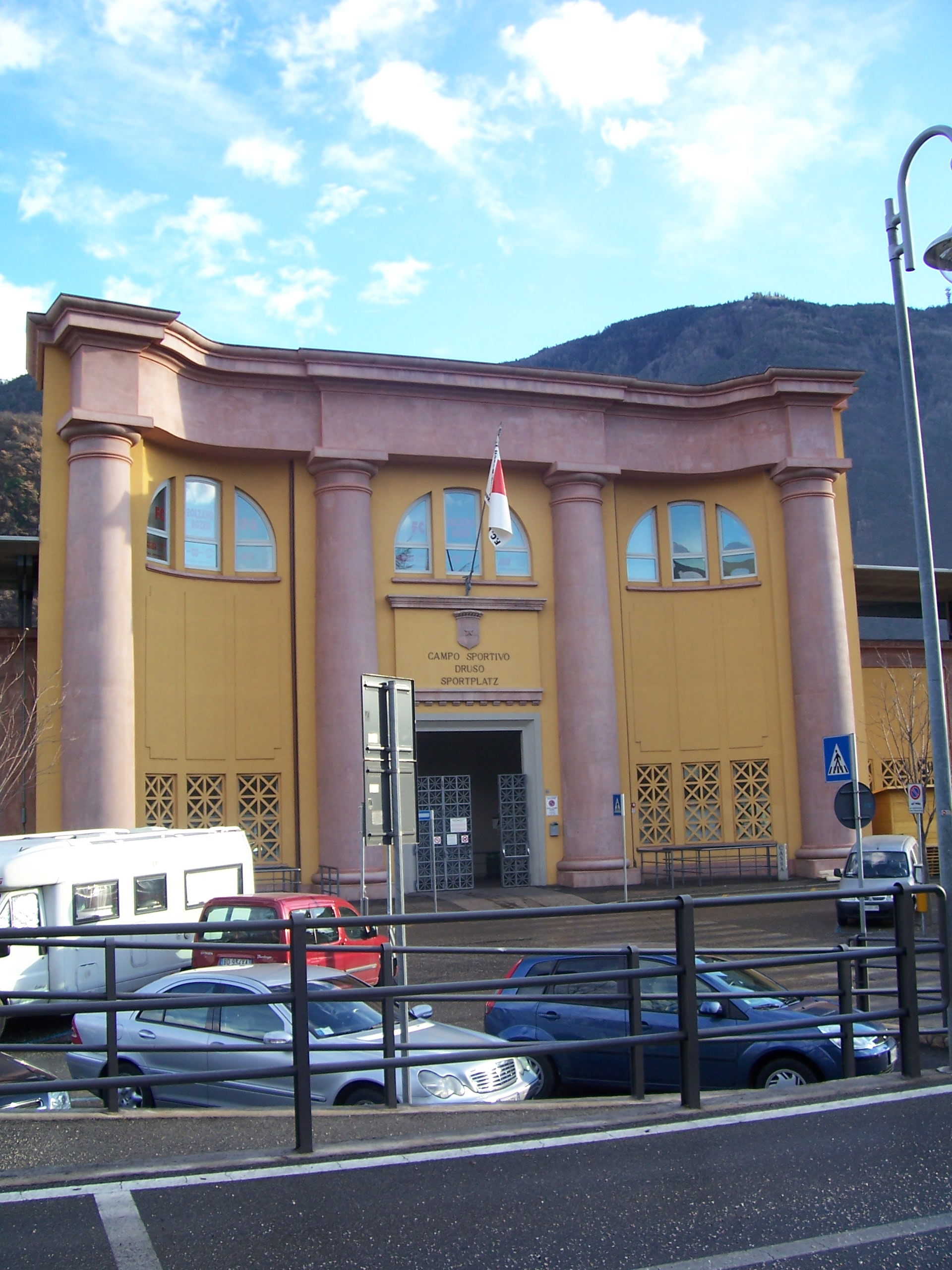 Campo sportivo "Druso", Bolzano / Sportplatz "Druso", Bozen